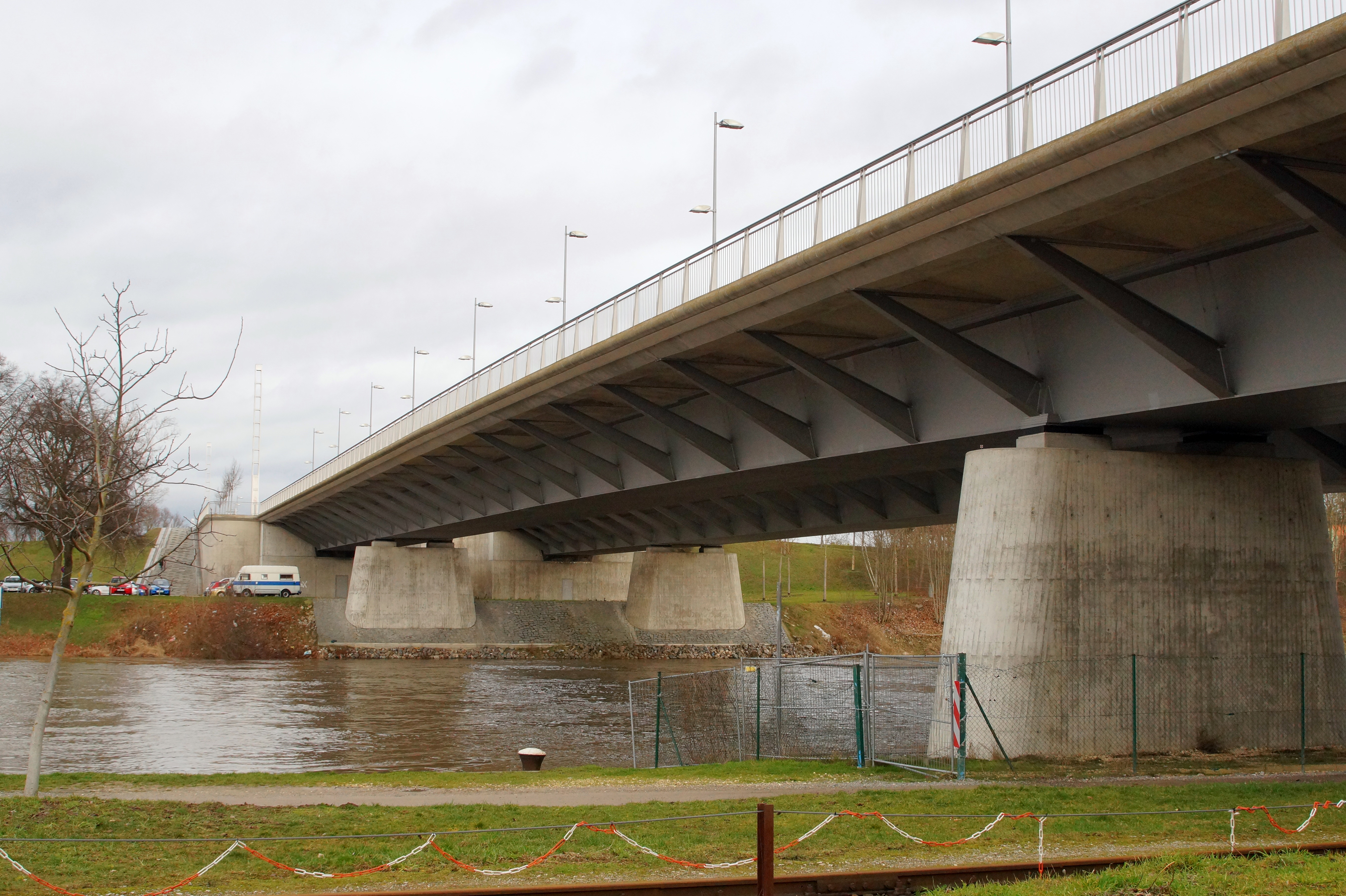 Regensburg, südliche Nibelungenbrücke (2016)